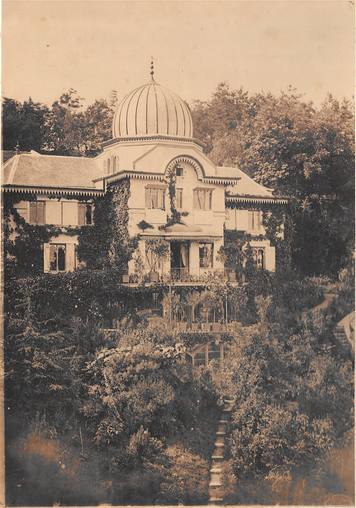 Villa des Tuaires, photographie albuminée, 1860-1870, Musées de Langres ©